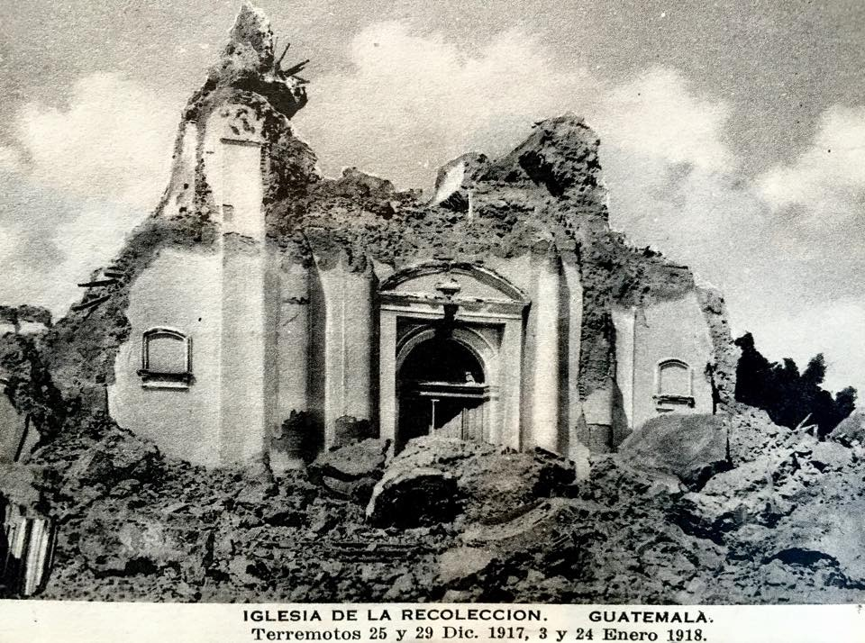 Iglesia de la Recolección luego de los terremotos de 1917 y 1918.